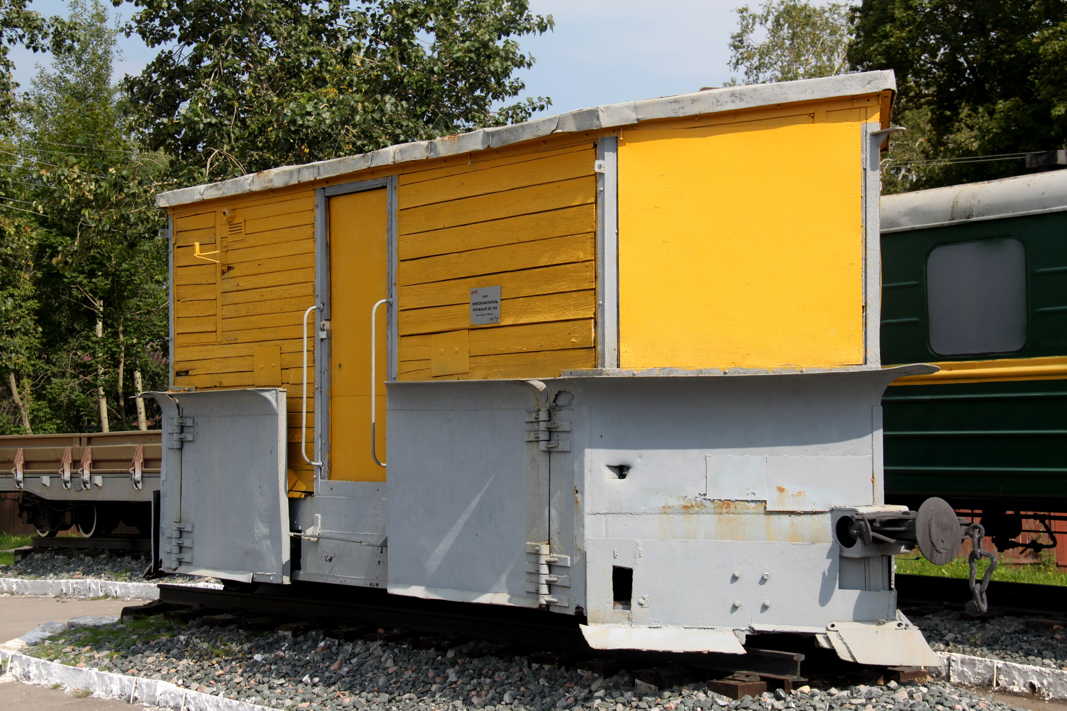 Плужный снегоочиститель СО 750 в музее узкоколейной техники станции Тумская